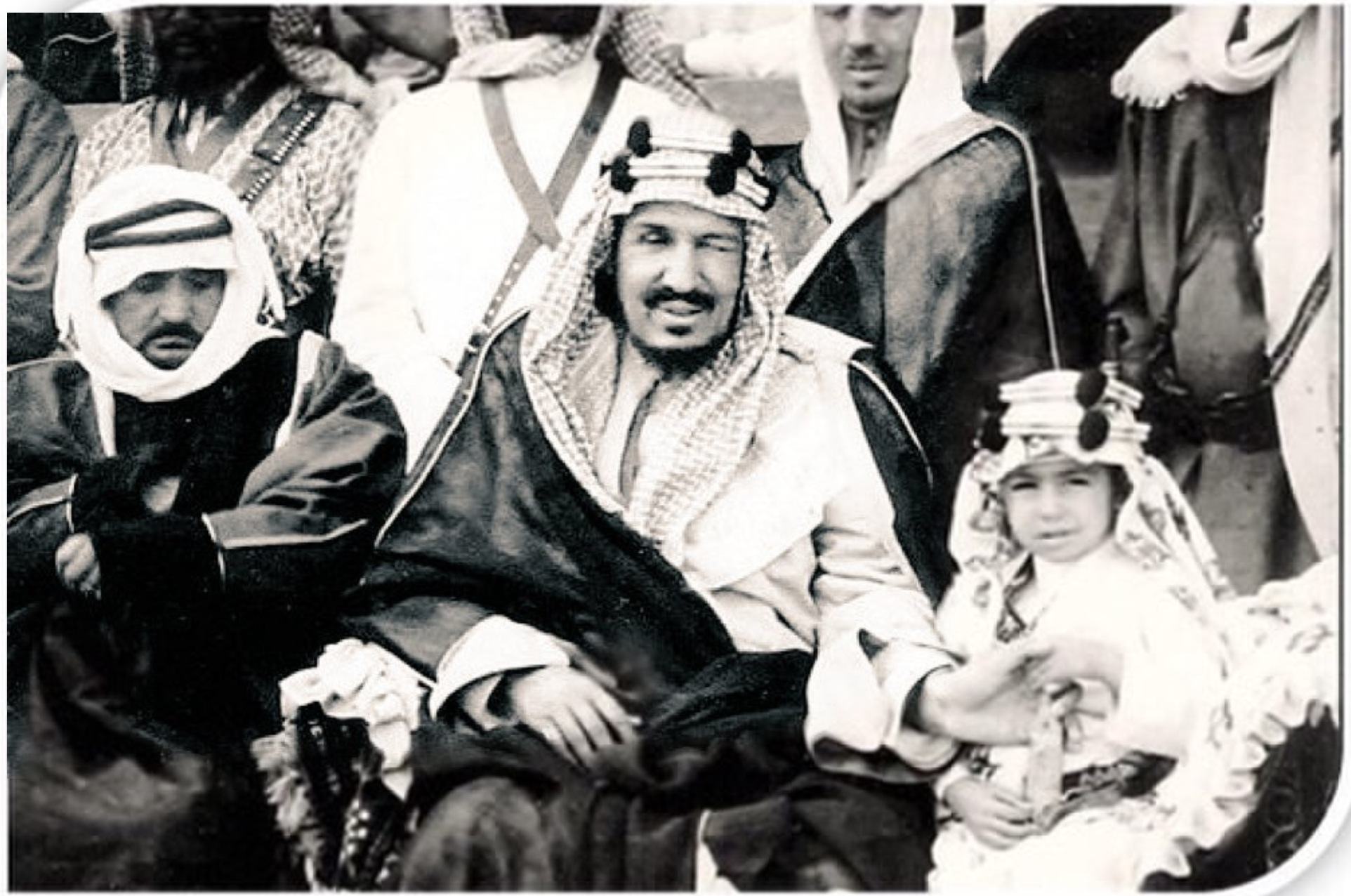 الأمير النوري الشعلان وبجانبه الملك عبدالعزيز آل سعود وأبنه الأمير نواف بن عبدالعزيز